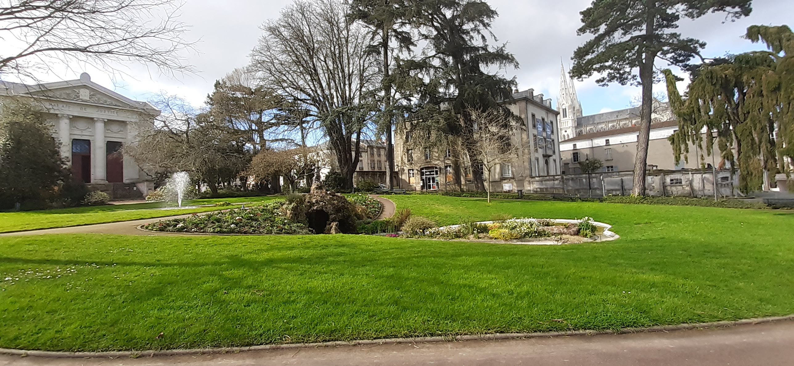 Fontaine du jardin du Mail à Cholet (Maine-et-Loire, France) ainsi que le tribunal d'instance ou palais de justice.